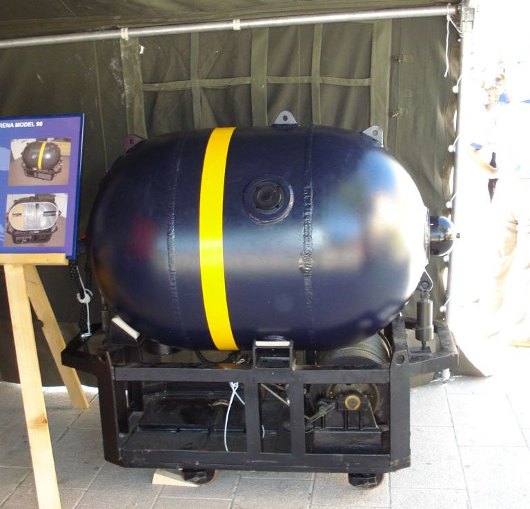 Mina nekontaktna sidrena model 90